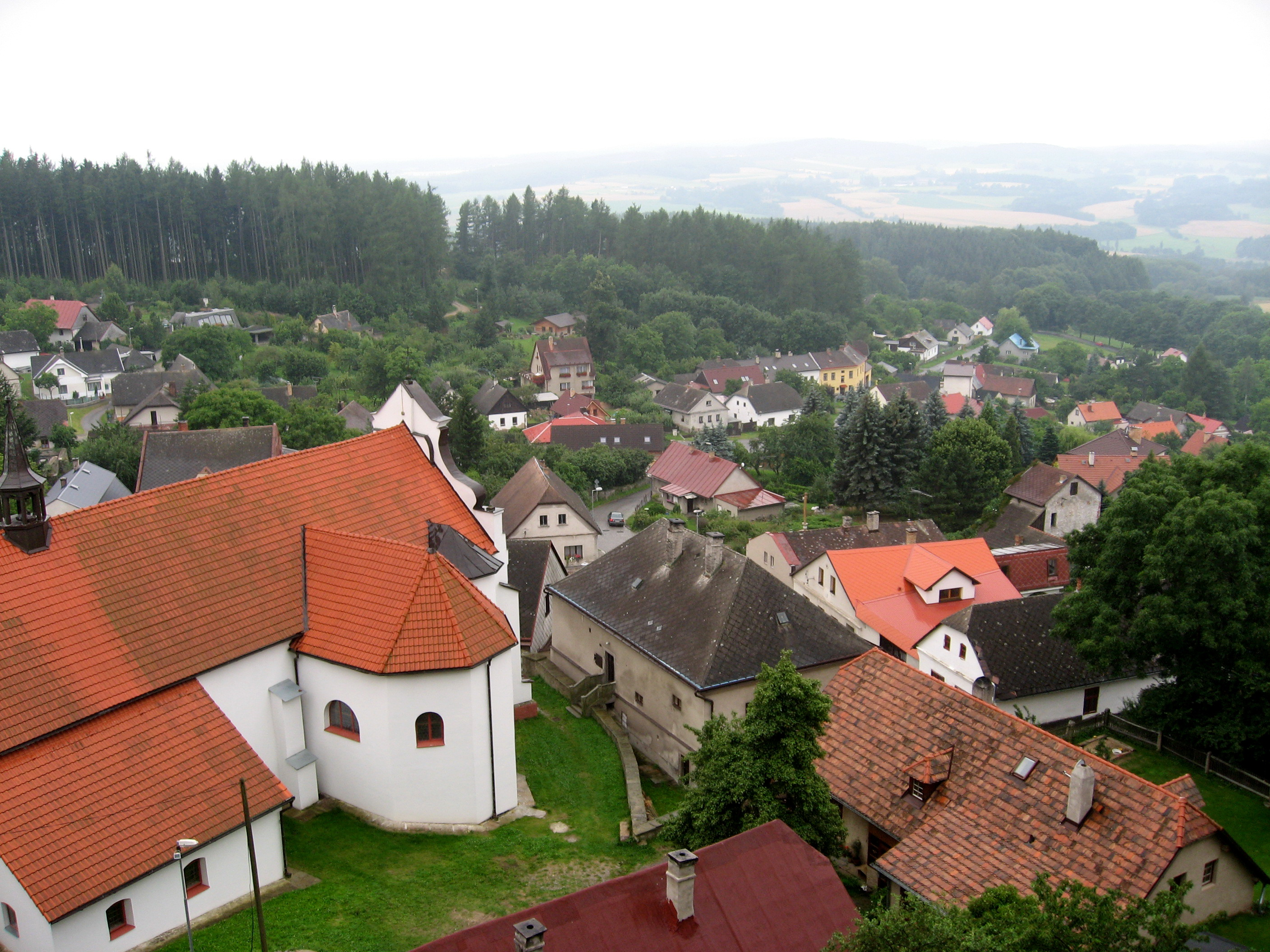 Výhled z hradu Lipnice nad Sázavou